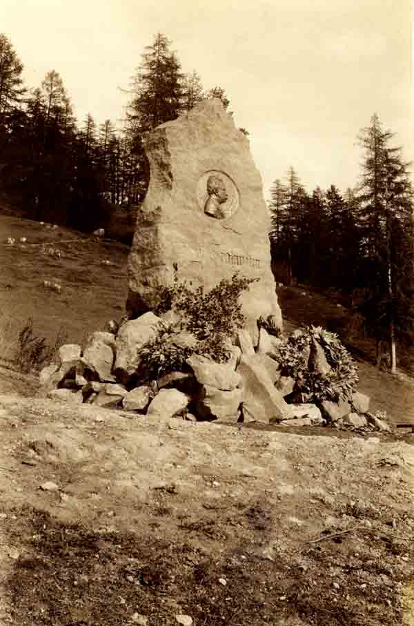 Das Monument an Paul Grohmann in St. Ulrich in Gröden